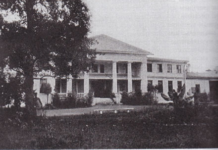 Усадебный дом в Никольском-Обольянинове